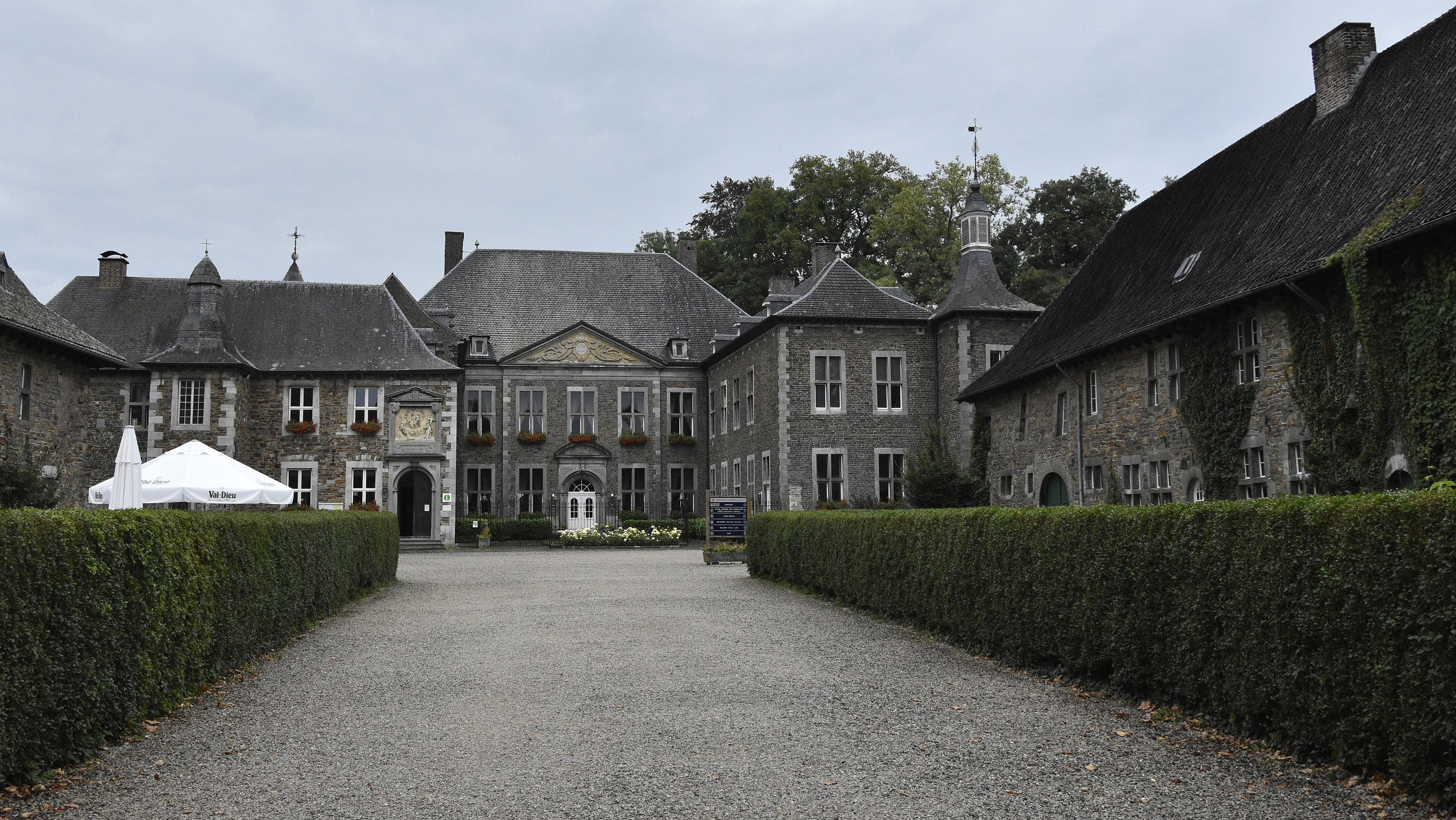 Abdij van Val-Dieu 29-08-2018 13-46-23 This photo of immovable heritage has been taken in the Walloon Region